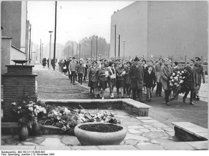 Berlin, Jugendstunde, Gedenkstätte für Reinhold Huhn Zentralbild Spremberg 13.1..1964 Jugendweihe-Teilnehmer aus mehreren Bezirken der DDR legten am 13.11.1964 an der Gedenkstätte des am 18.6.1962 von Westberliner Terroristen ermordeten Grenzsoldaten Reinhold Huhn Kränze nieder. Die Gedenkstätte für Reinhold Huhn steht in der Jerusalemstraße, unmittelbar an der Staatsgrenze der DDR.